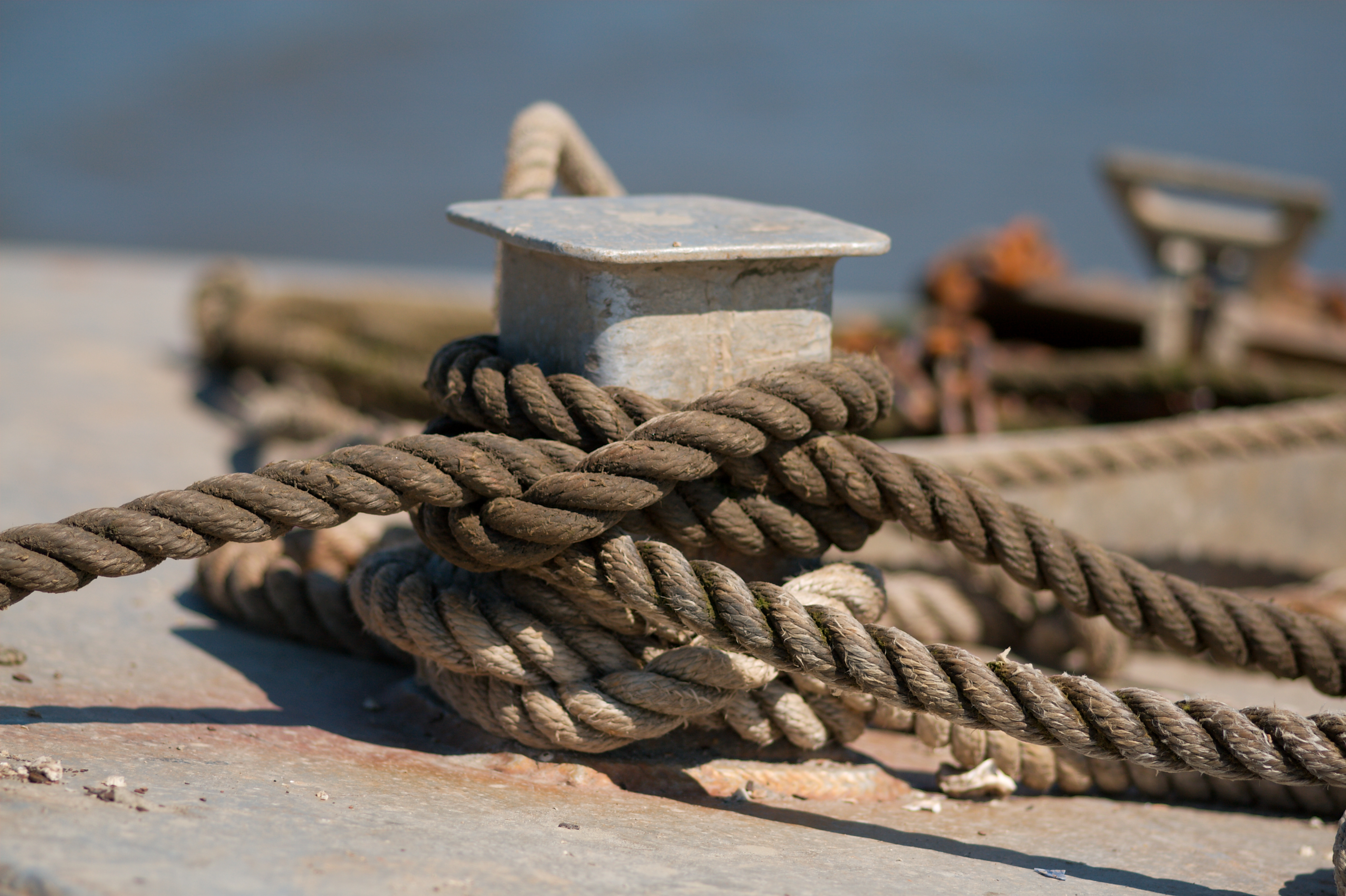 Webeleinstek um einen kleinen Poller